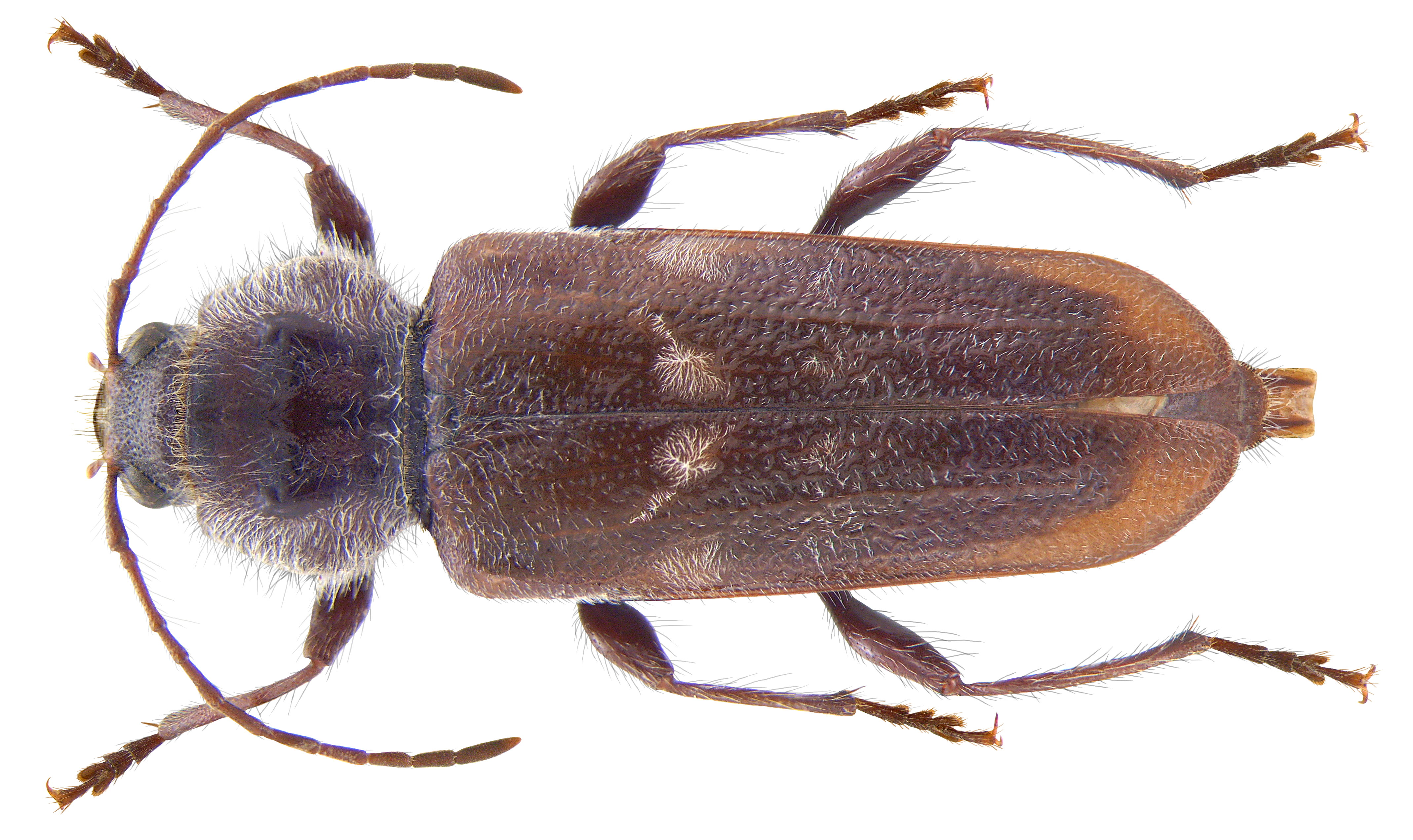 Familie: Cerambycidae Groesse: 15,4 mm Verbreitung: Europa, Nordafrika Ökologie: Entwicklung in Nadelholz Fundort: Mallorca, Puerto de Soller leg.det. U.Schmidt, 1988 Photo: U.Schmidt, 2009